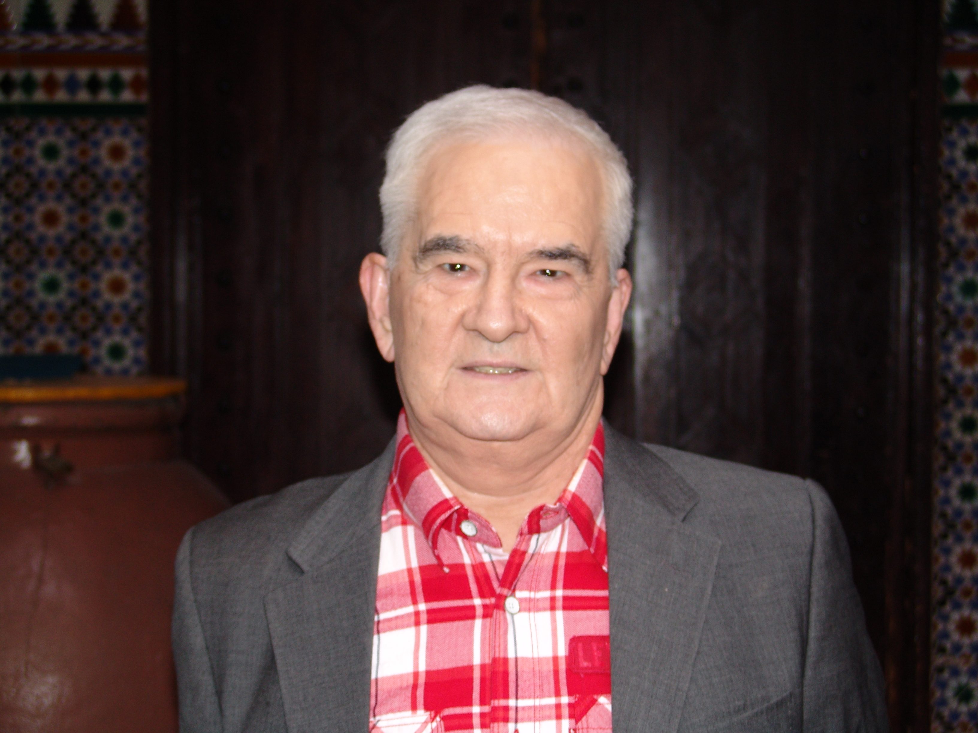 Carlos Castro, 2010 no lançamento do Canal